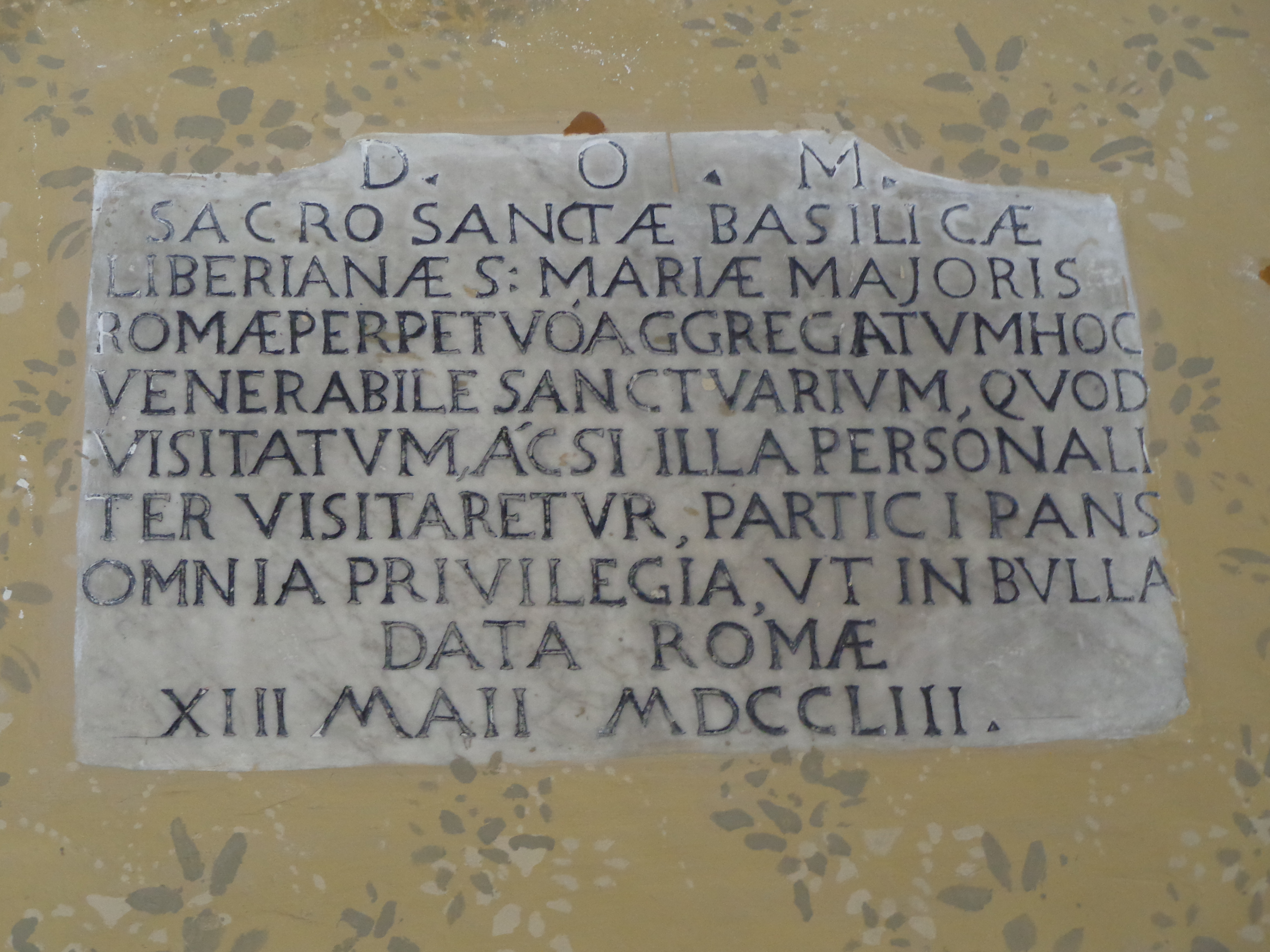 Tindari chiesa liberiana